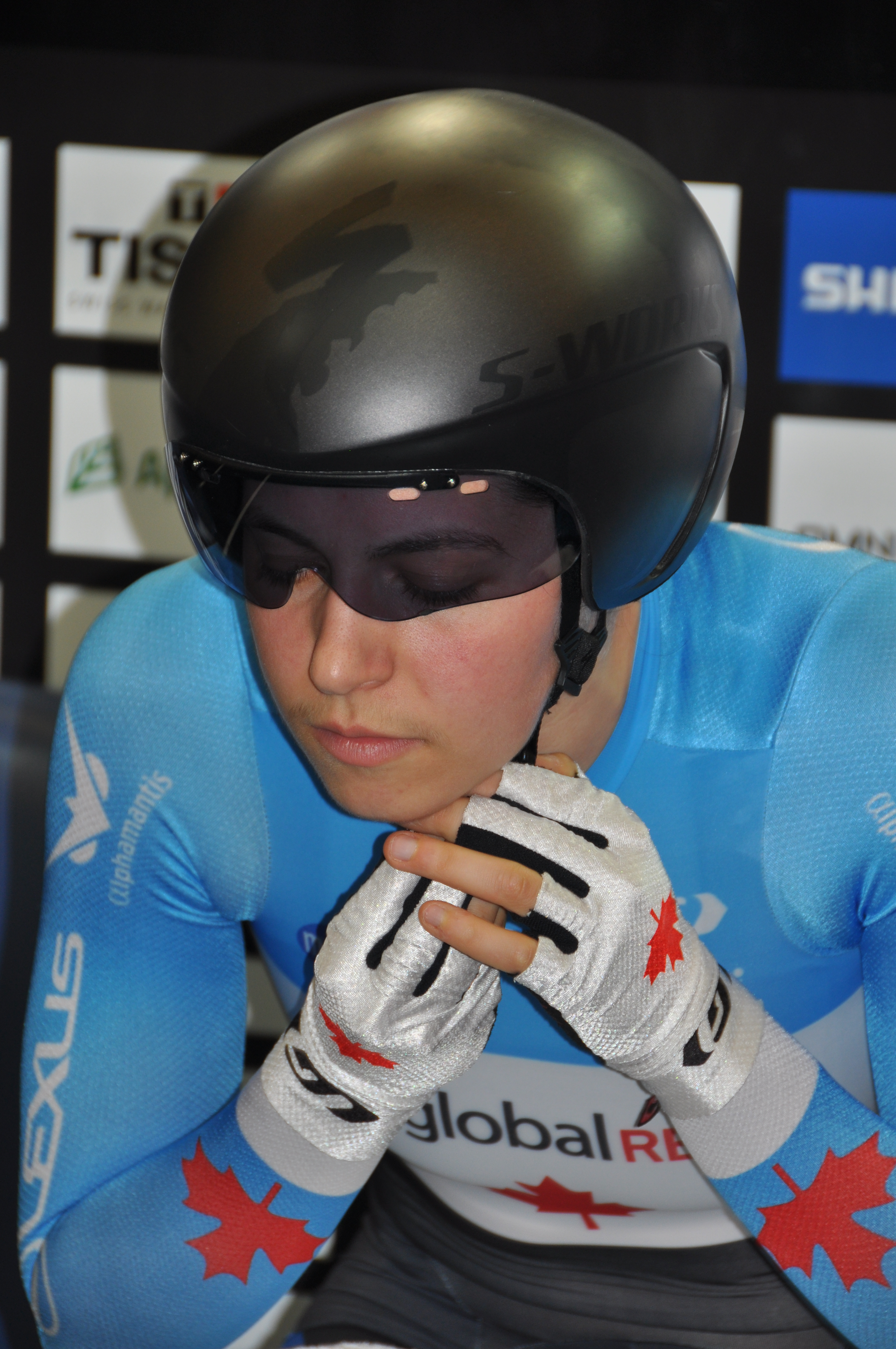 Annie Foreman-Mackey, kanadische Radsportlerin